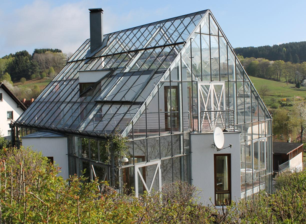 Solarhaus aus feuerverzinktem Stahl in Gewächshausbauweise